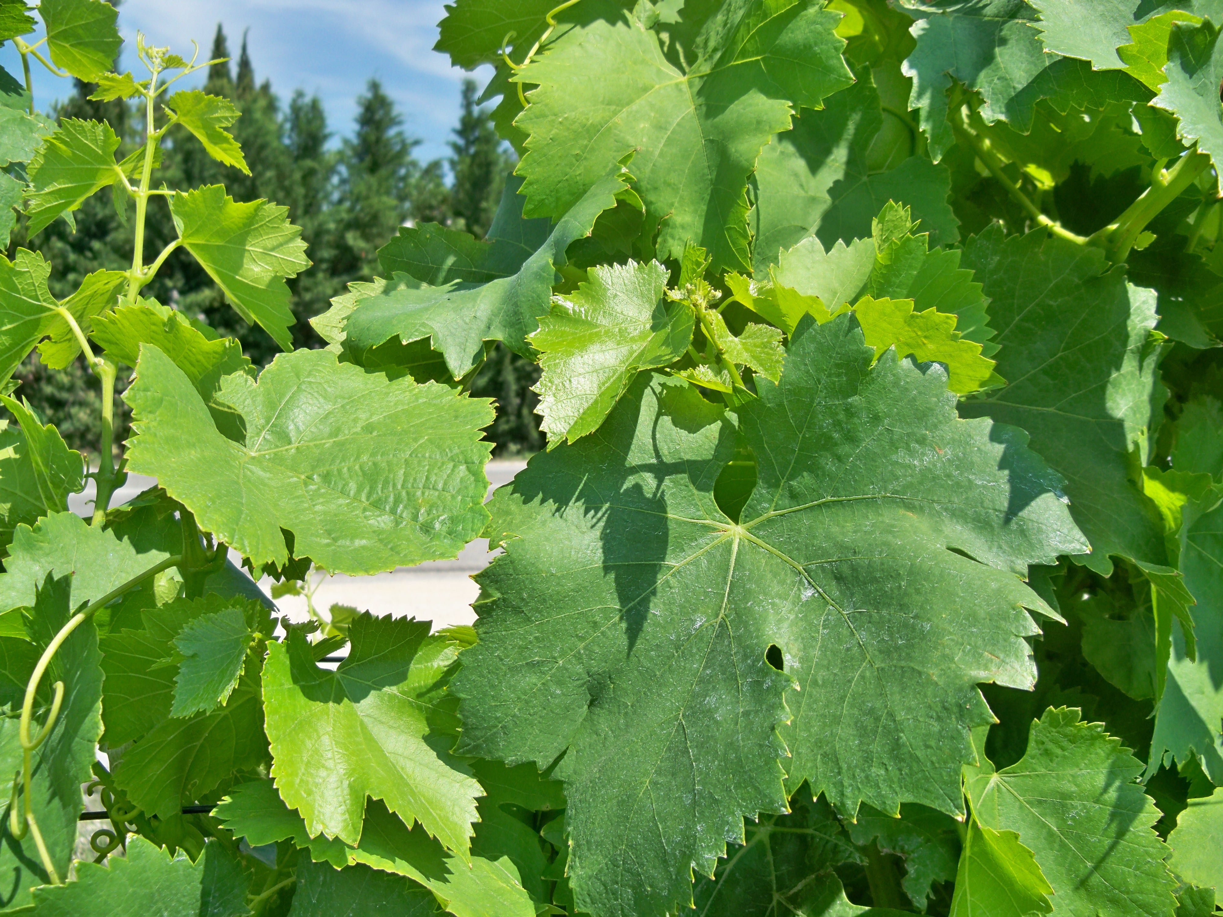 Feuilles de Vignes - Grenache Blanc